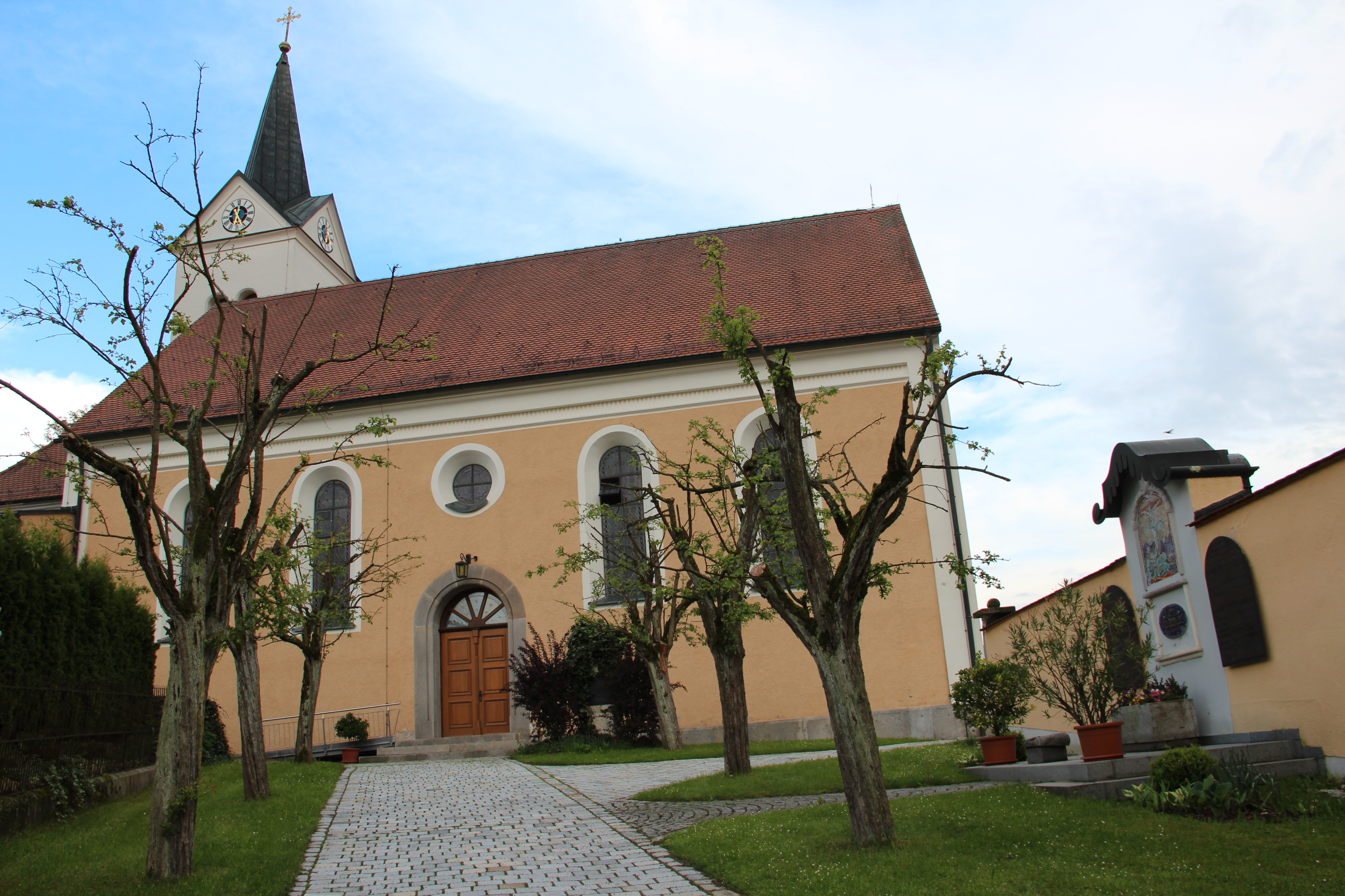 Pfarrkirche St. Michael in Weidenthal; Gemeinde Guteneck, Landkreis Schwandorf, Oberpfalz, Bayern (2013)